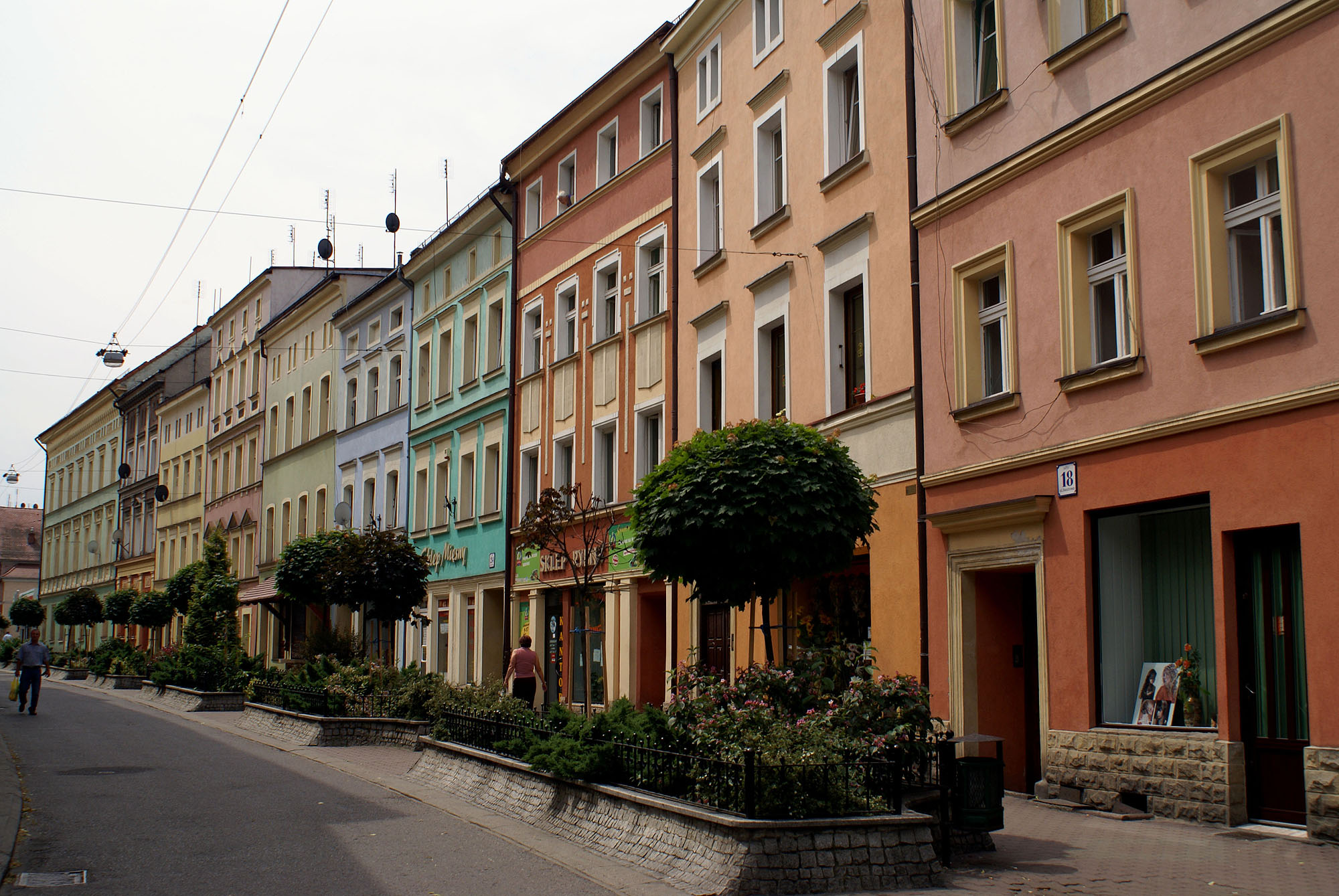 Złotoryja - ulica Basztowa